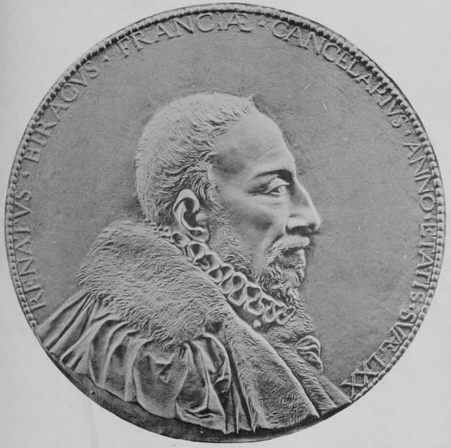 Médaille à l'effigie de René de Birague.